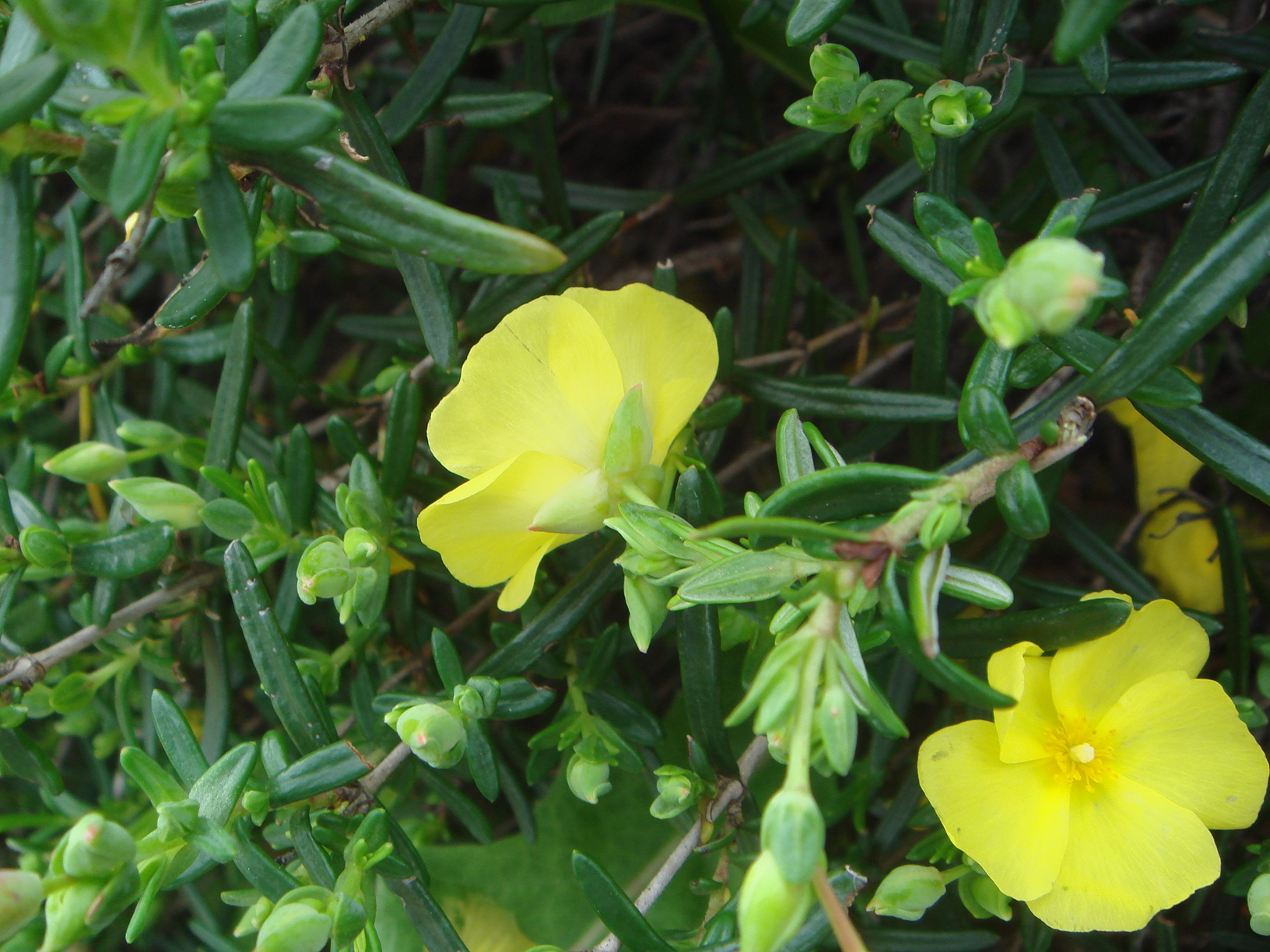 (Halimium calycinum) Chiclana (Cádiz) España